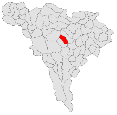 Categorie:Hărţi ale judeţului Alba